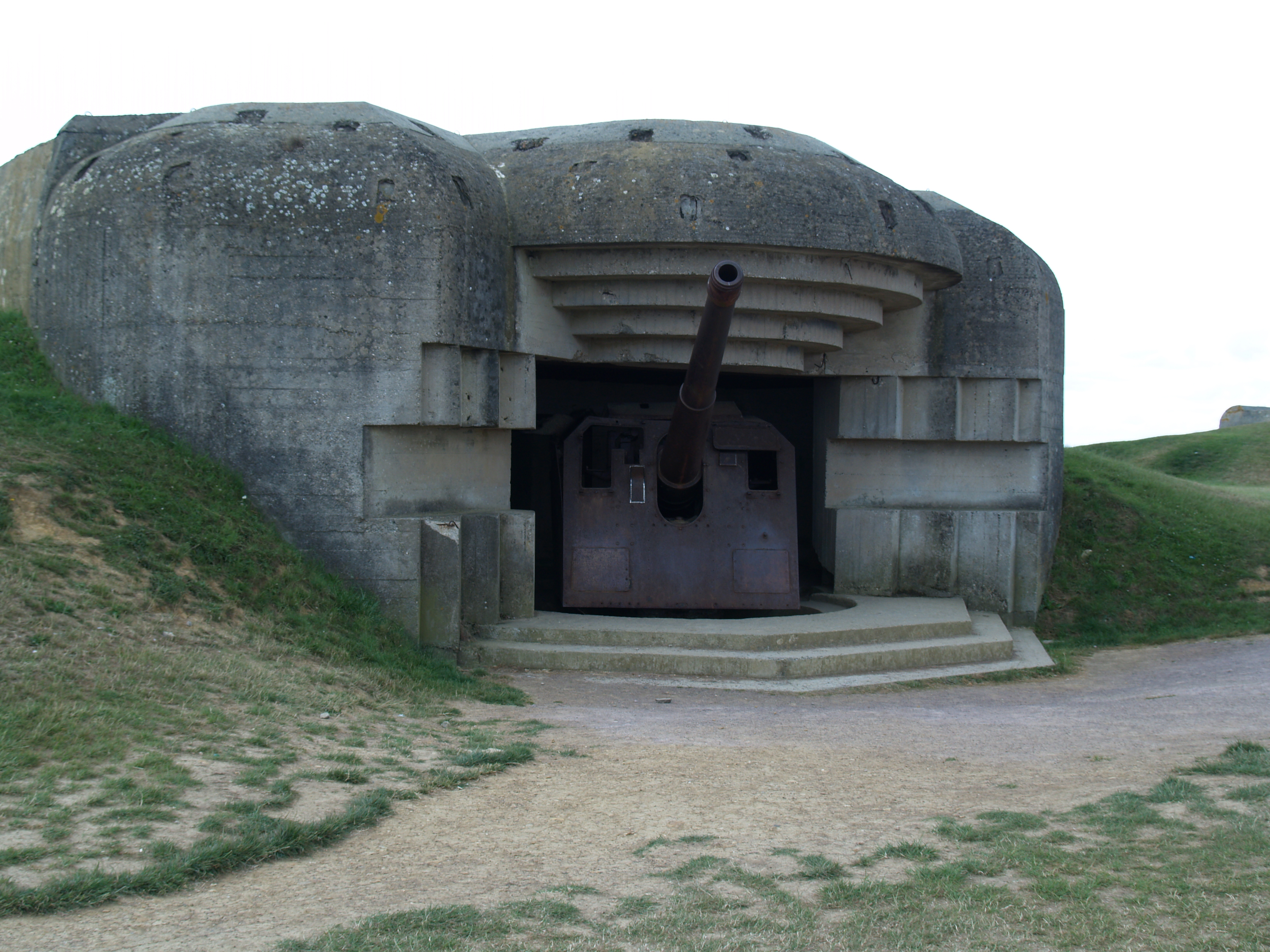 Longues-sur-Mer Battery